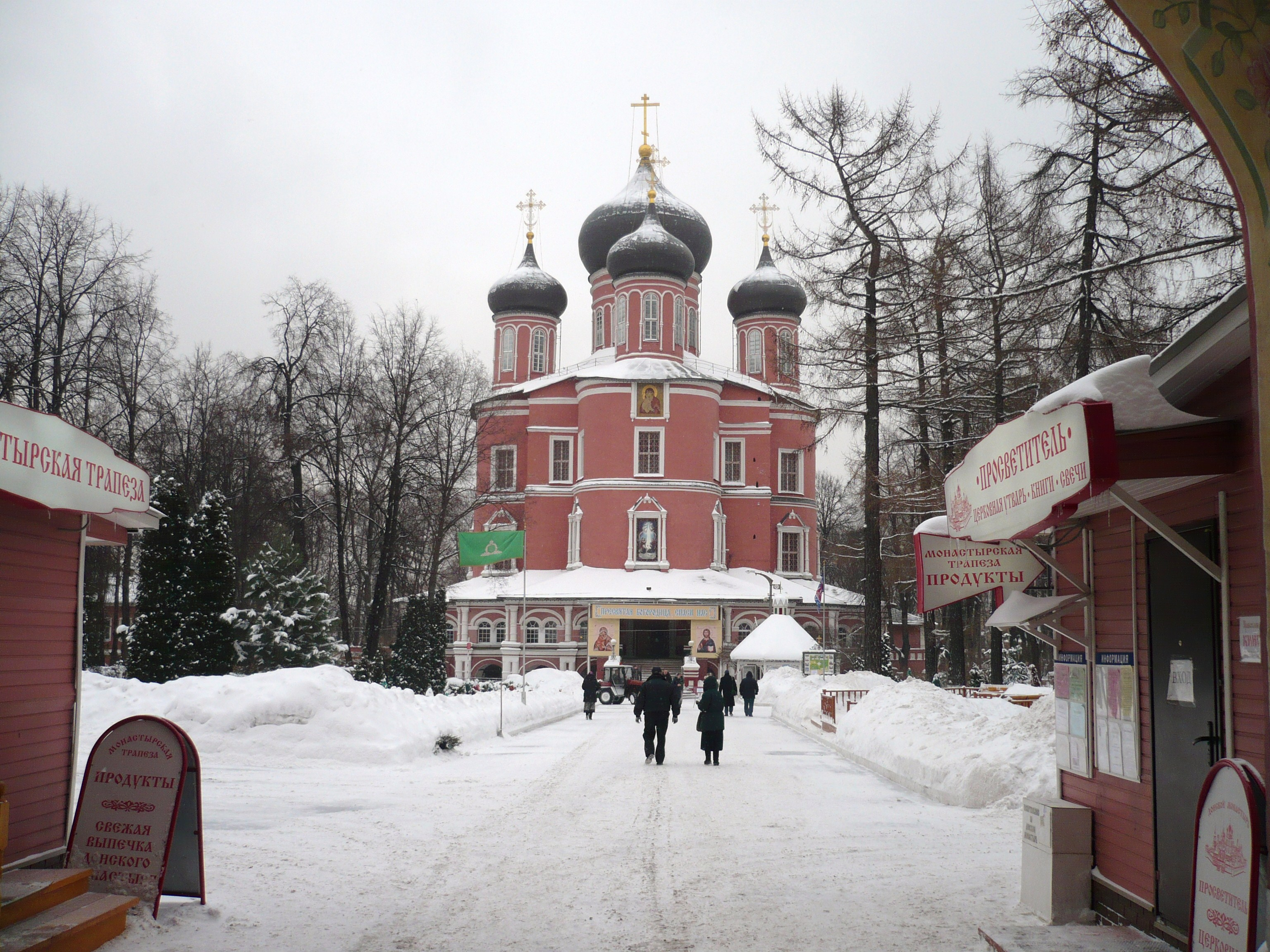 Донской монастырь